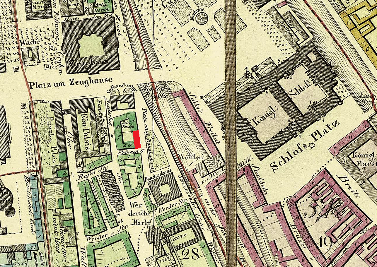 Lageplan des Hotel d'Angleterre (Englischer Hof) am Schinkelplatz (Nr. 2) in Berlin.